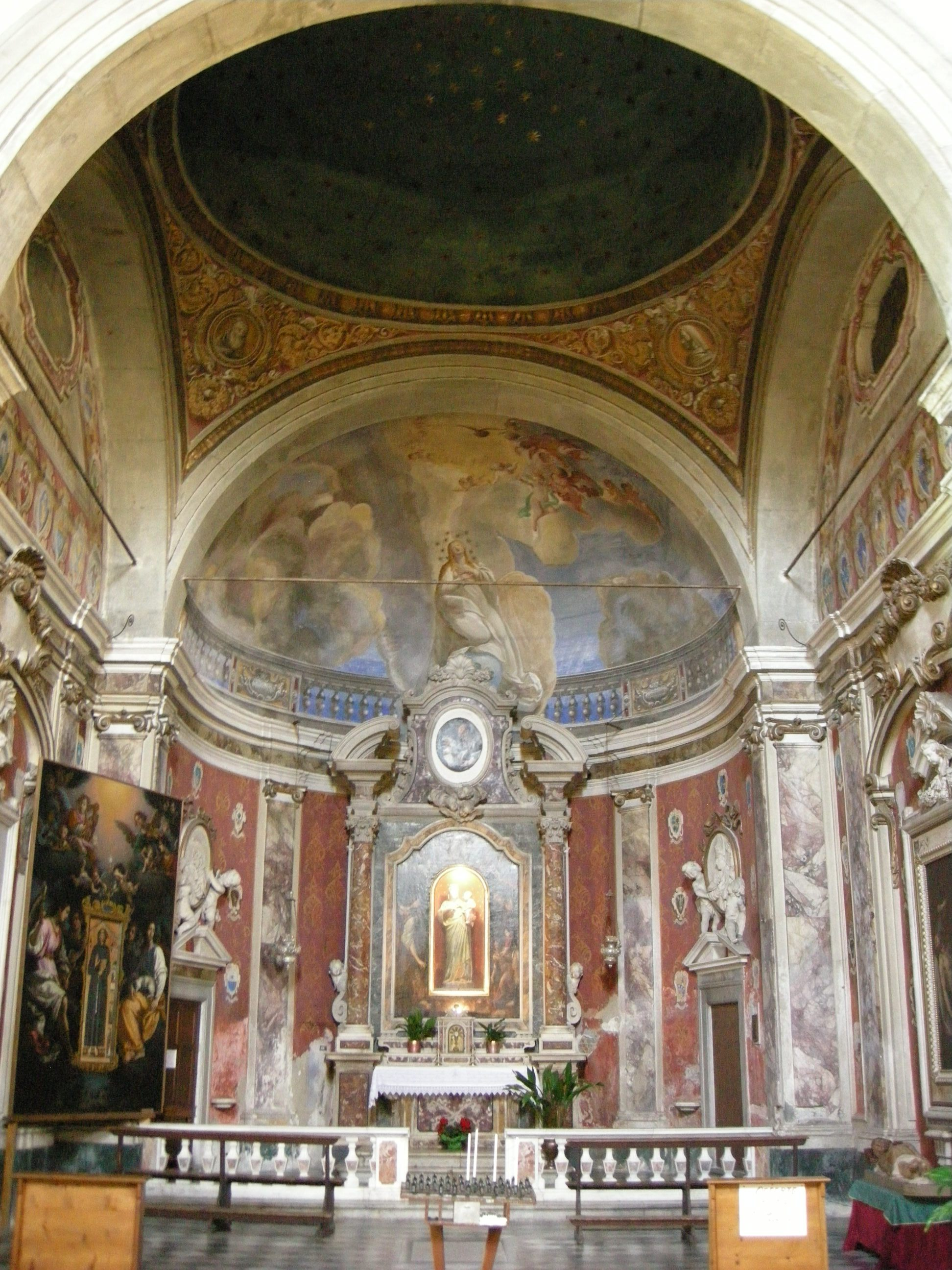 Pescia, san francesco, cappella dell'immacolata concezione